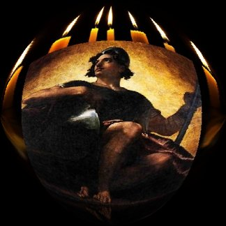 Urielbild vor Kerzen auf einem schwarzen Talaar; Geschenk der Societas Urielis an Pfarrer Daniel in 2005